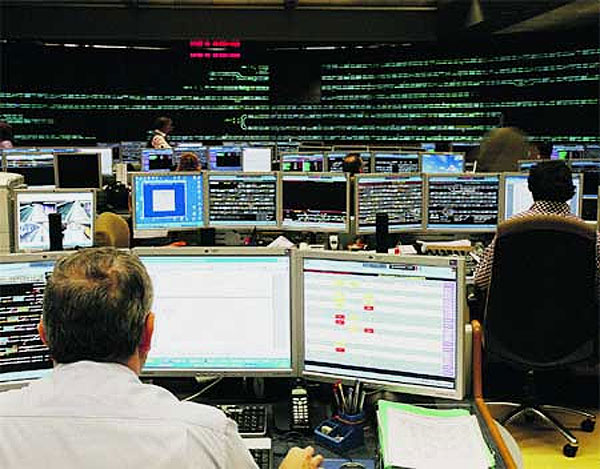 Centro de Control del Metro de Madrid